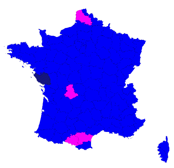 Partis arrivés en tête des élections européennes de 2009 dans chaque département de France métropolitaine.